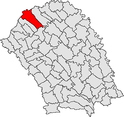 Categorie:Hărţi ale judeţului Botoşani